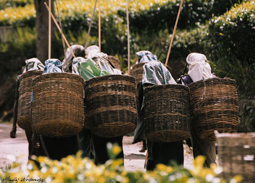 2002, Sri Lanka 2002. Zbieraczki herbaty. Fotografia z cyklu "Kobiety Świata”. Fot. Mikołaj Nesterowicz